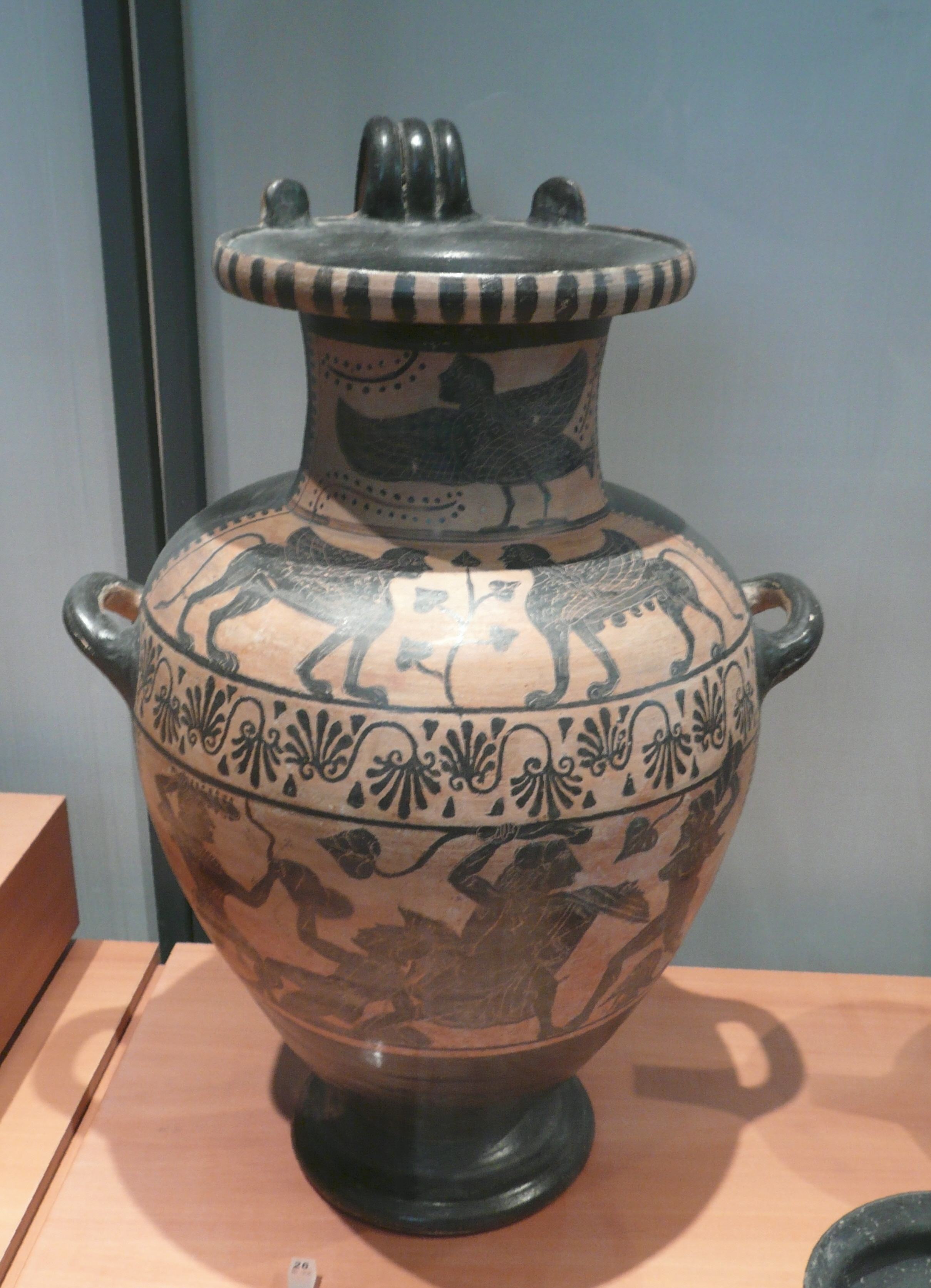 Etrurie, hydrie à figures noires début du Ve siècle avant J.C., musée d'archéologie méditerranéenne de la vieille Charité à Marseille.